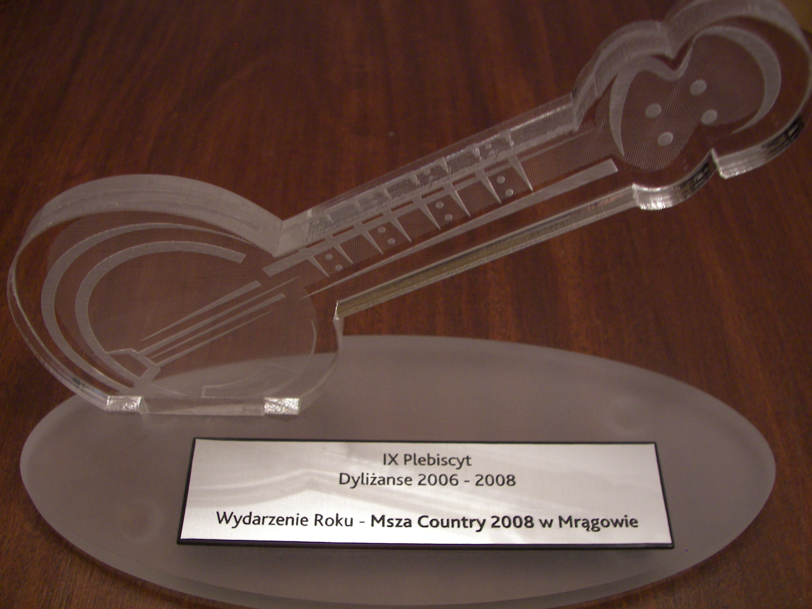 Statuetka IX Plebiscytu "Dyliżanse" (2006-2008) w kategorii "Wydarzenie Roku" dla Mszy Country 2008 w Mrągowie.